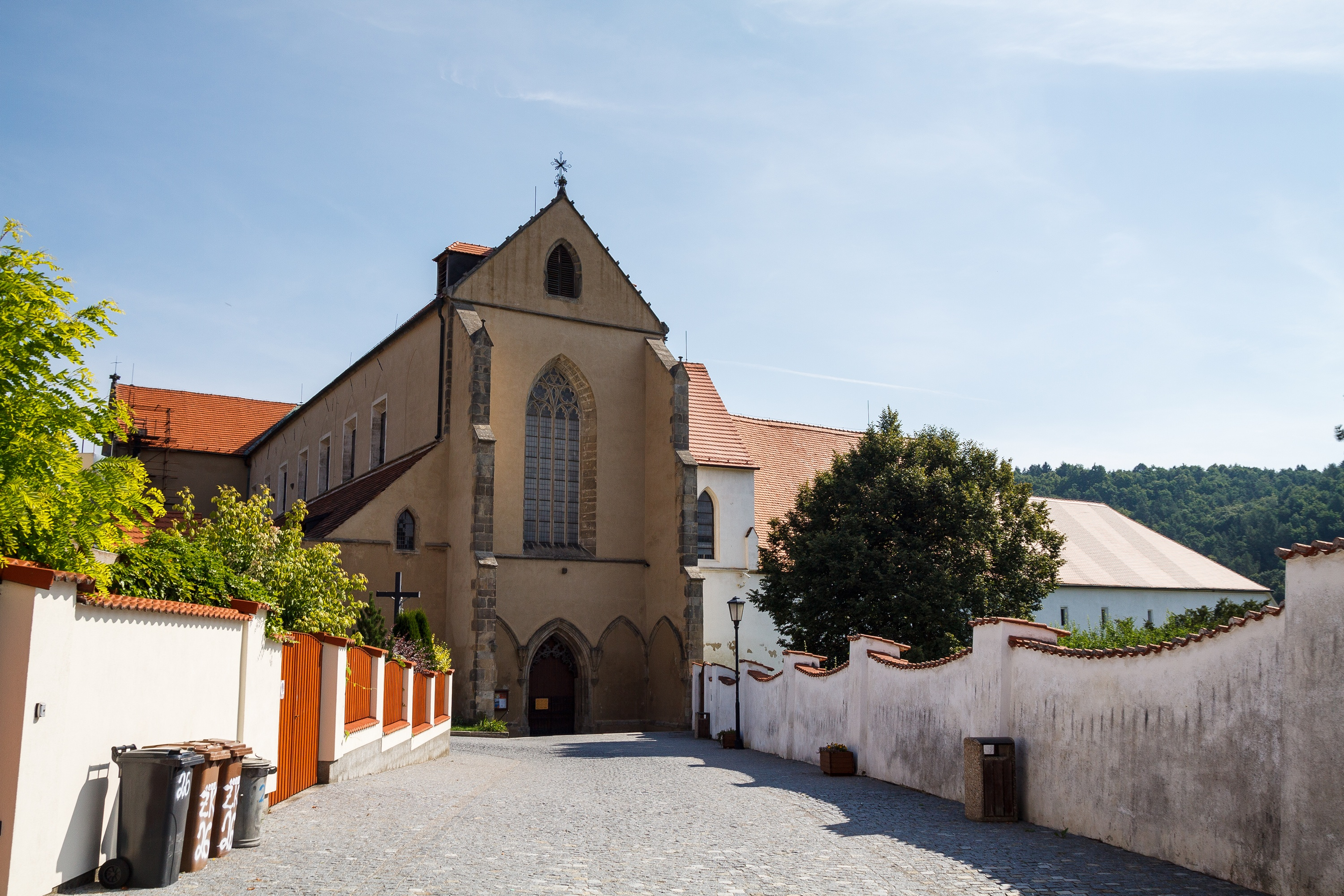 Klášter Zlatá Koruna, Zlatá Koruna 1, Zlatá Koruna.